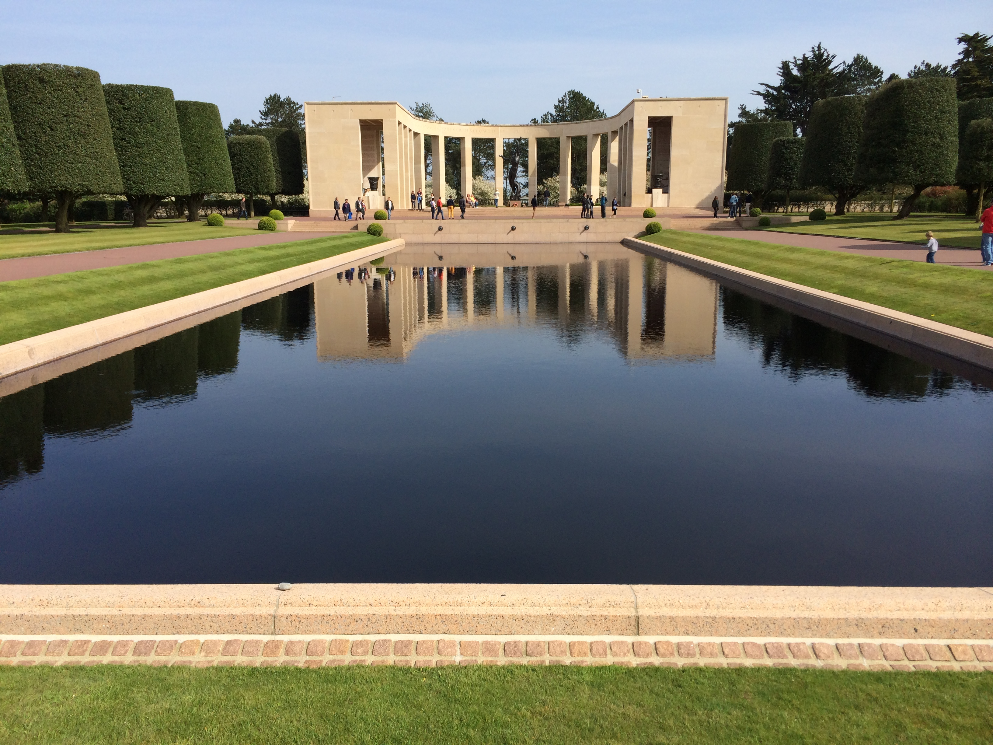 Foto del monumento alla memoria americano in Normandia, riflesso sul lago